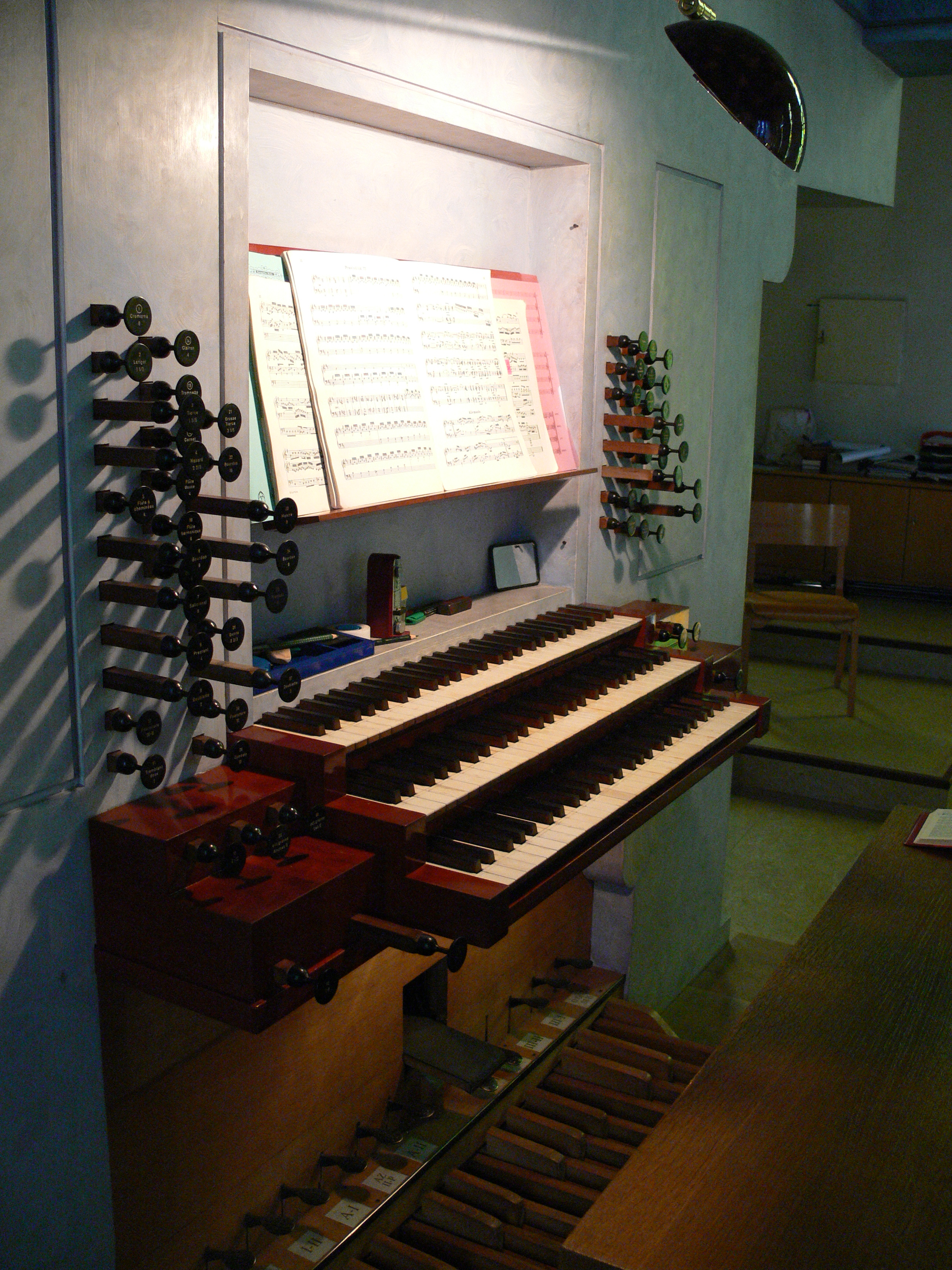 Pfarrkirche St. Nikolaus, Friedrichshafen (Innenstadt) Spieltisch der Orgel